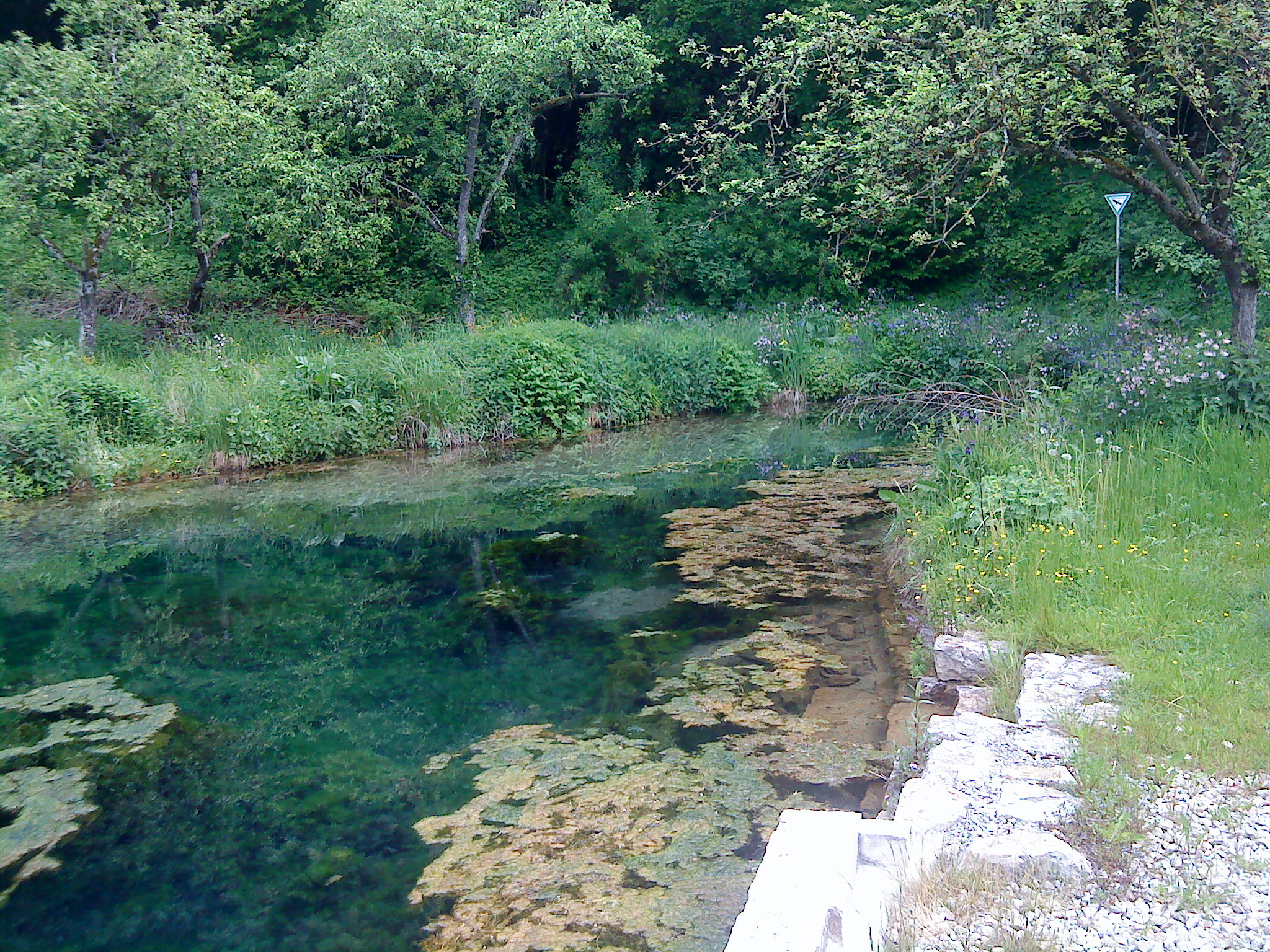 Die Mühlbachquelle in Mühlbach